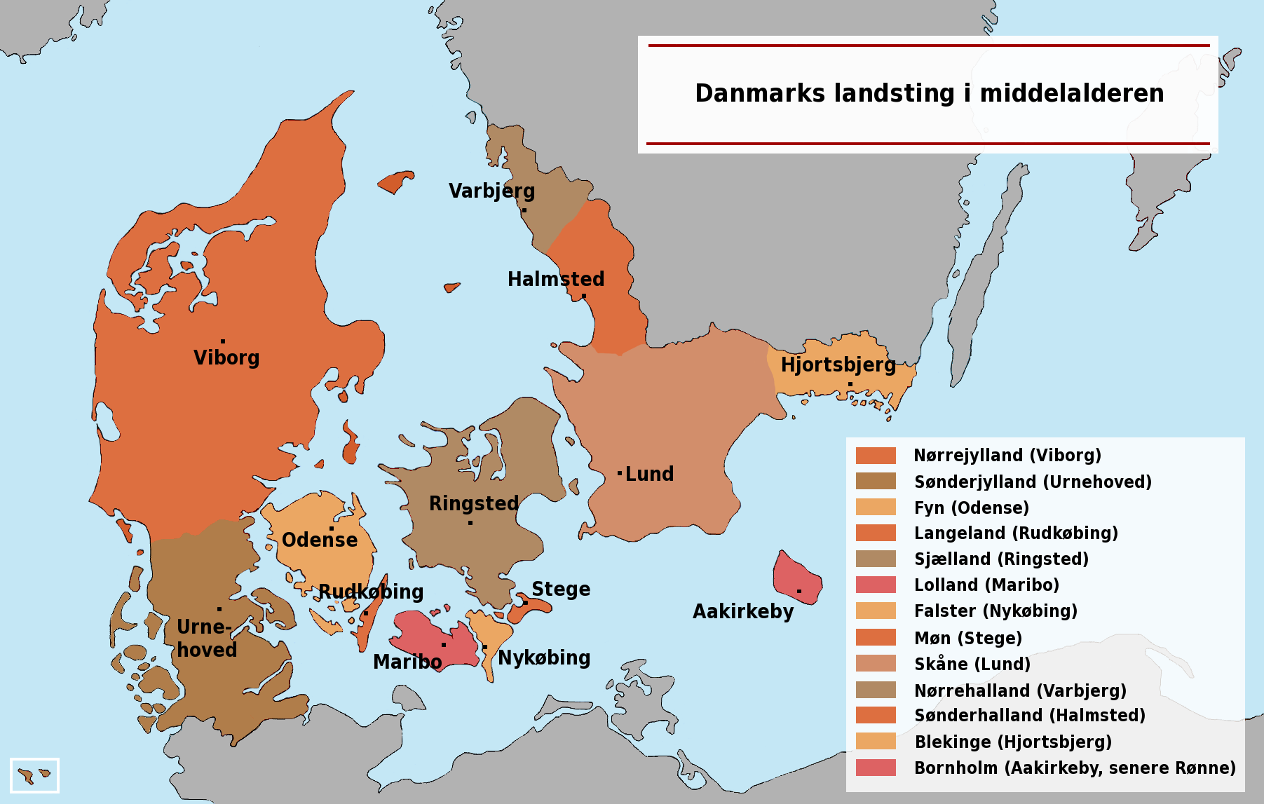 Danmarks landsting i middelalderen.